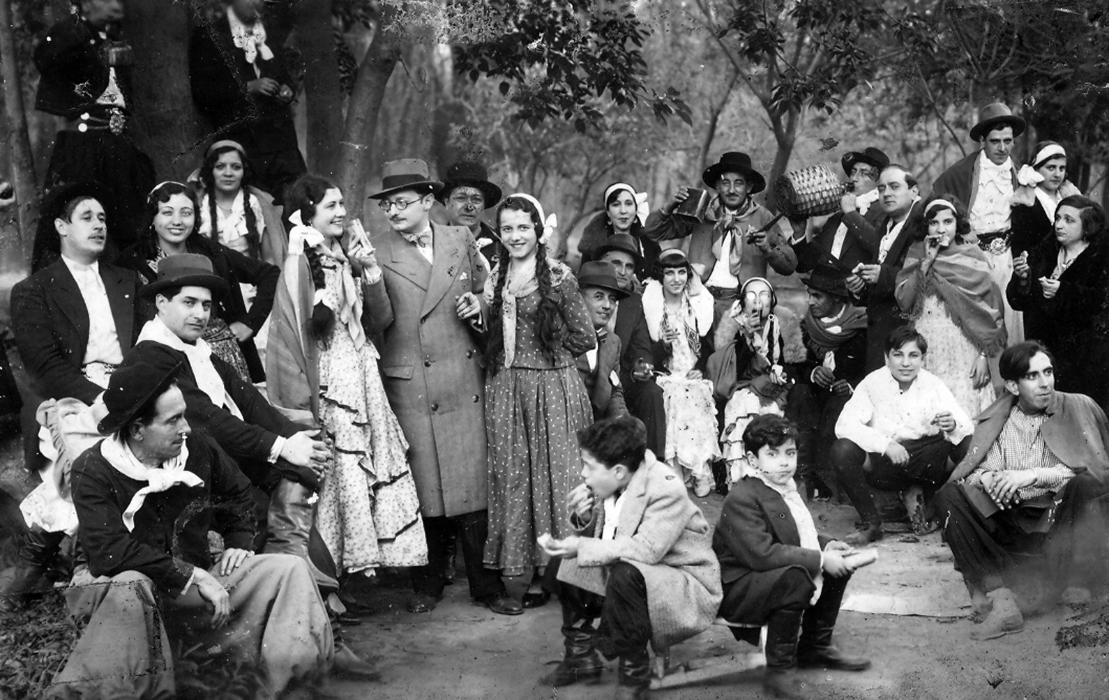 Fotografía de rodaje de Nobleza gaucha, película de 1915.